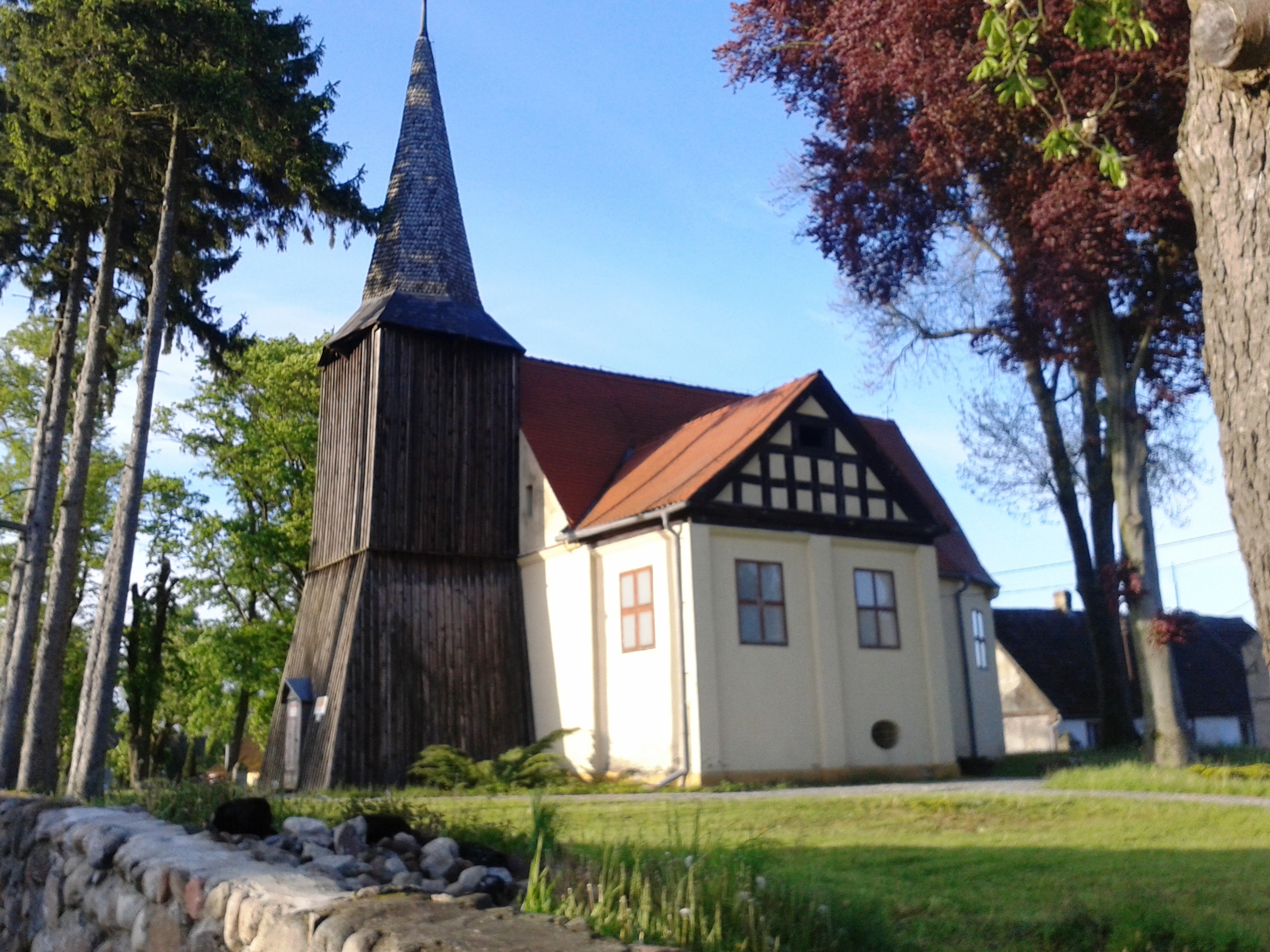 Wysiedle - dawny kościół ewangelicki, ob. rzymskokatolicki kościół filialny p.w. Św. Trójcy, XVII, 1912